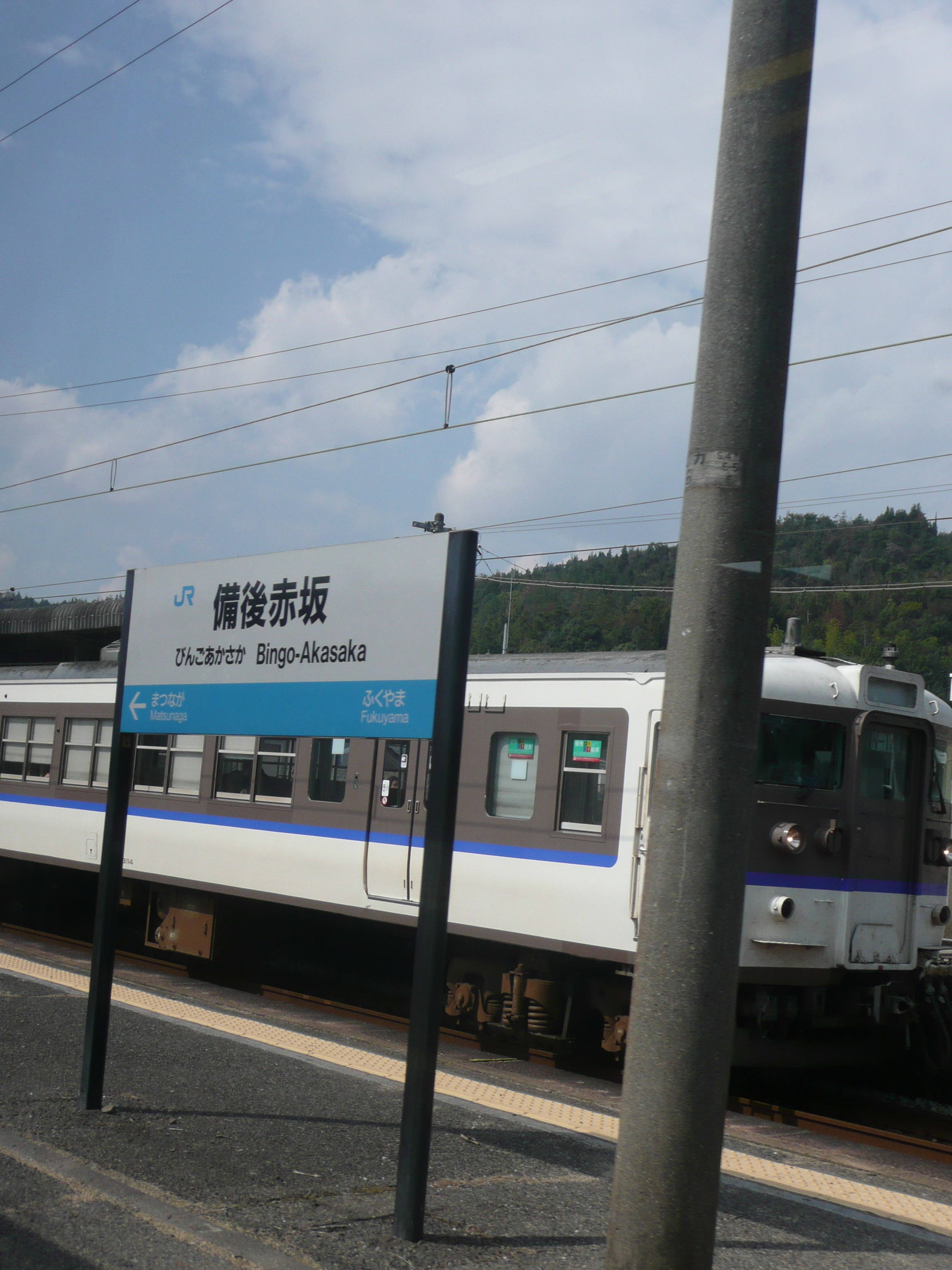 備後赤坂駅の看板